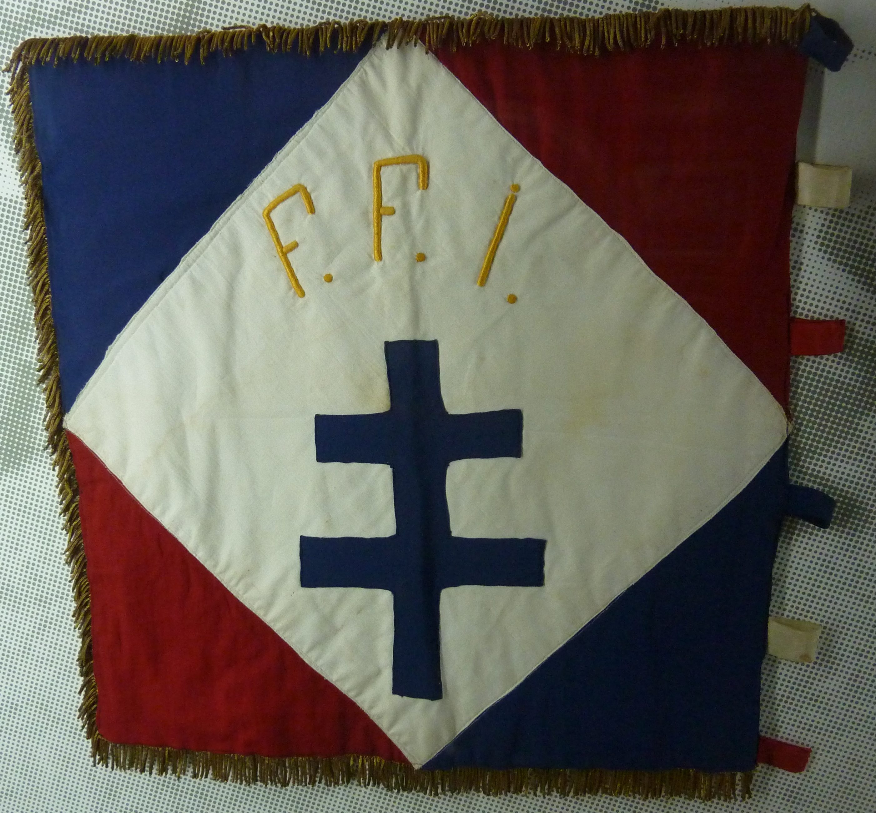 Le drapeau de la 2ème compagnie du 1er bataillon des FFI du Finistère. Cette compagnie, issue d'un groupe d'Eclaireurs de France entré en résistance dès juin 1940 qui effectua des missions de renseignement et des rapatriements d'aviateurs alliés ; elle incorpore les FFI en février 1944 et participa à la libération de Quimper le 8 août 1944 (musée de Bretagne à Rennes).